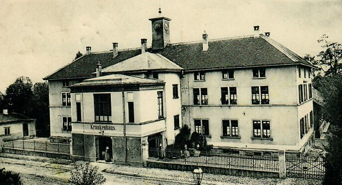 Krankenhaus von Esslingen, Ansichtskarte von Karl Liebhardt (Ausschnitt)